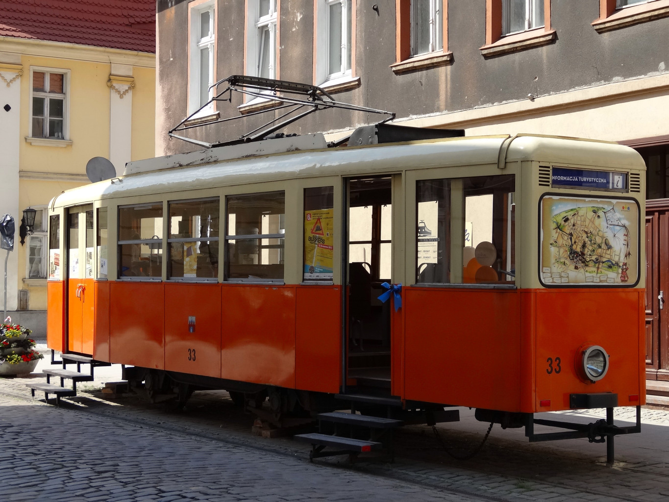 Ulica Długa na Starym Mieście w Bydgoszczy. Zabytkowy tramwaj, w którym mieści się Biuro Informacji Turystycznej.